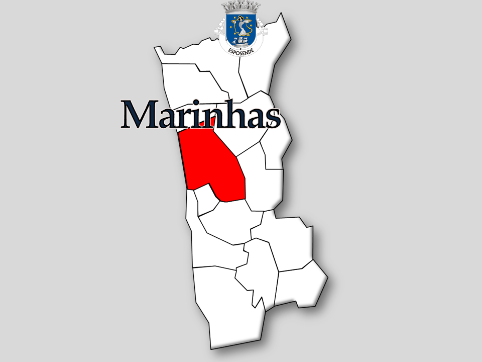 Censo 1864/2011